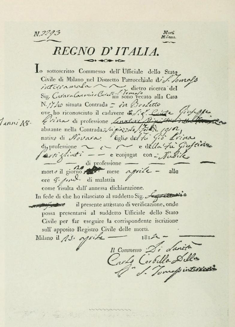 Certificato di morte del ministro Giuseppe Prina, assassnato a Milano il 20 aprile 1814 durante i moti seguiti alla caduta di Napoleone